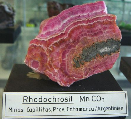 Rhodochrosit MnCo3, Minas Capillitas, Argentinien. Steht in der Mineraliensammlung der Universität Mainz. Foto: Benjamin Dahlhoff